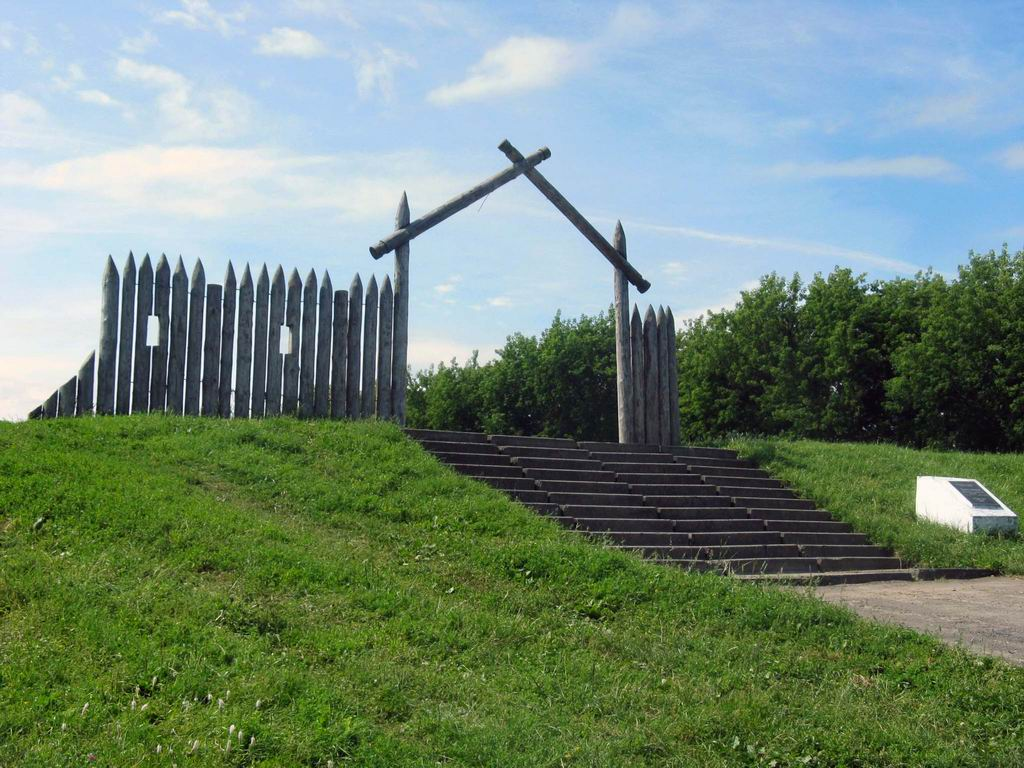 Беларуская (тарашкевіца): Рагачоў